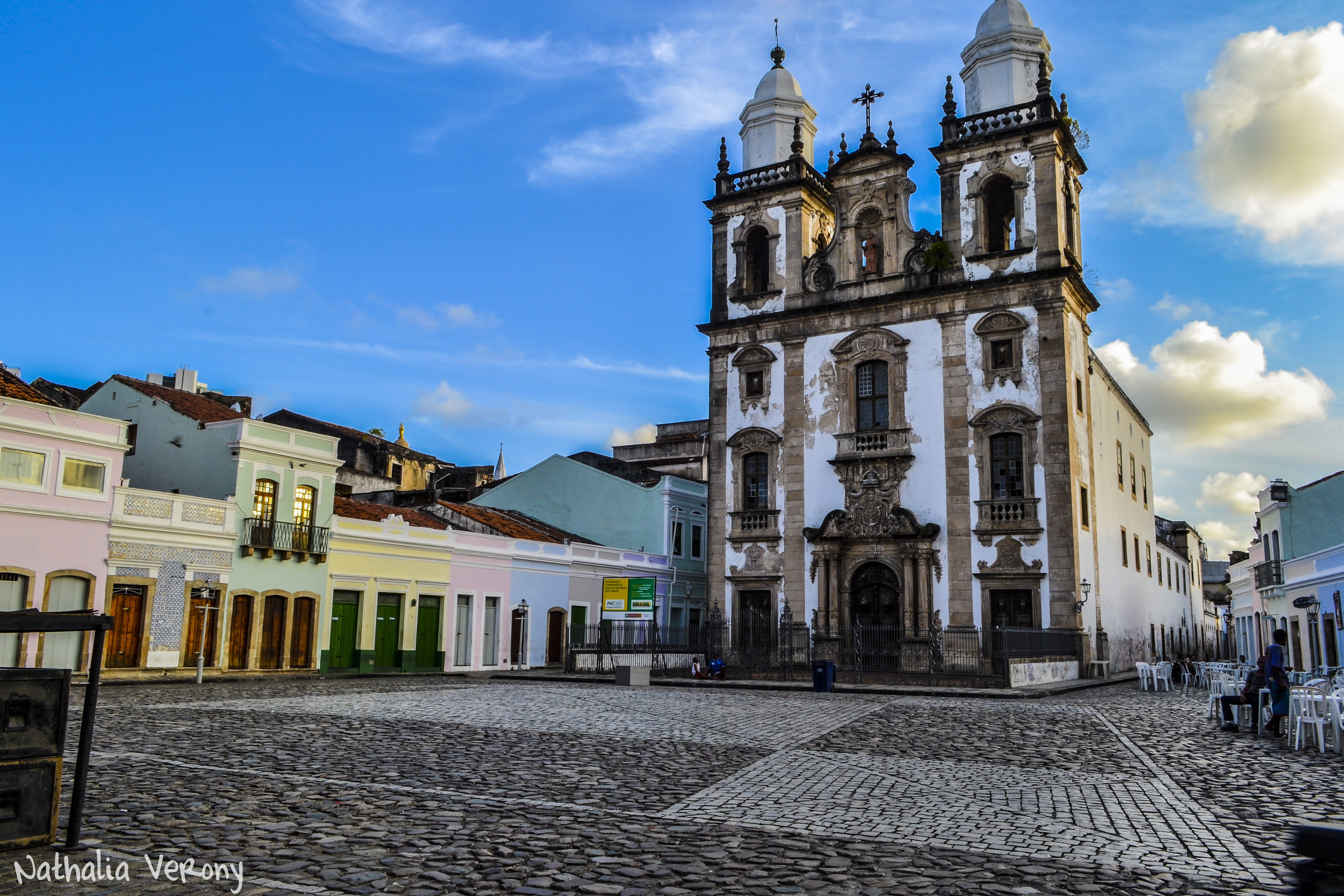 Pátio de são Pedro - Recife - Pernambuco